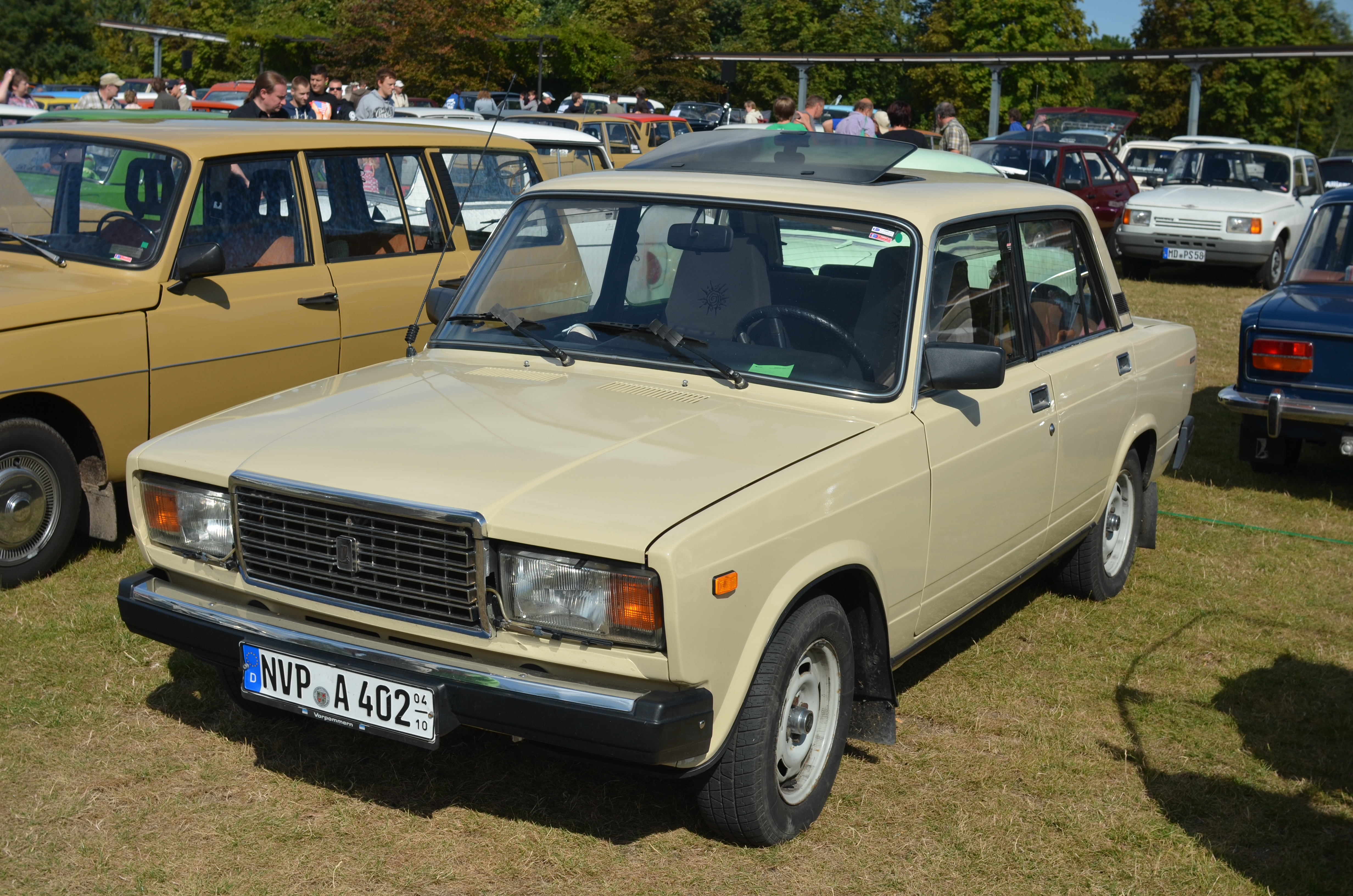 Lada